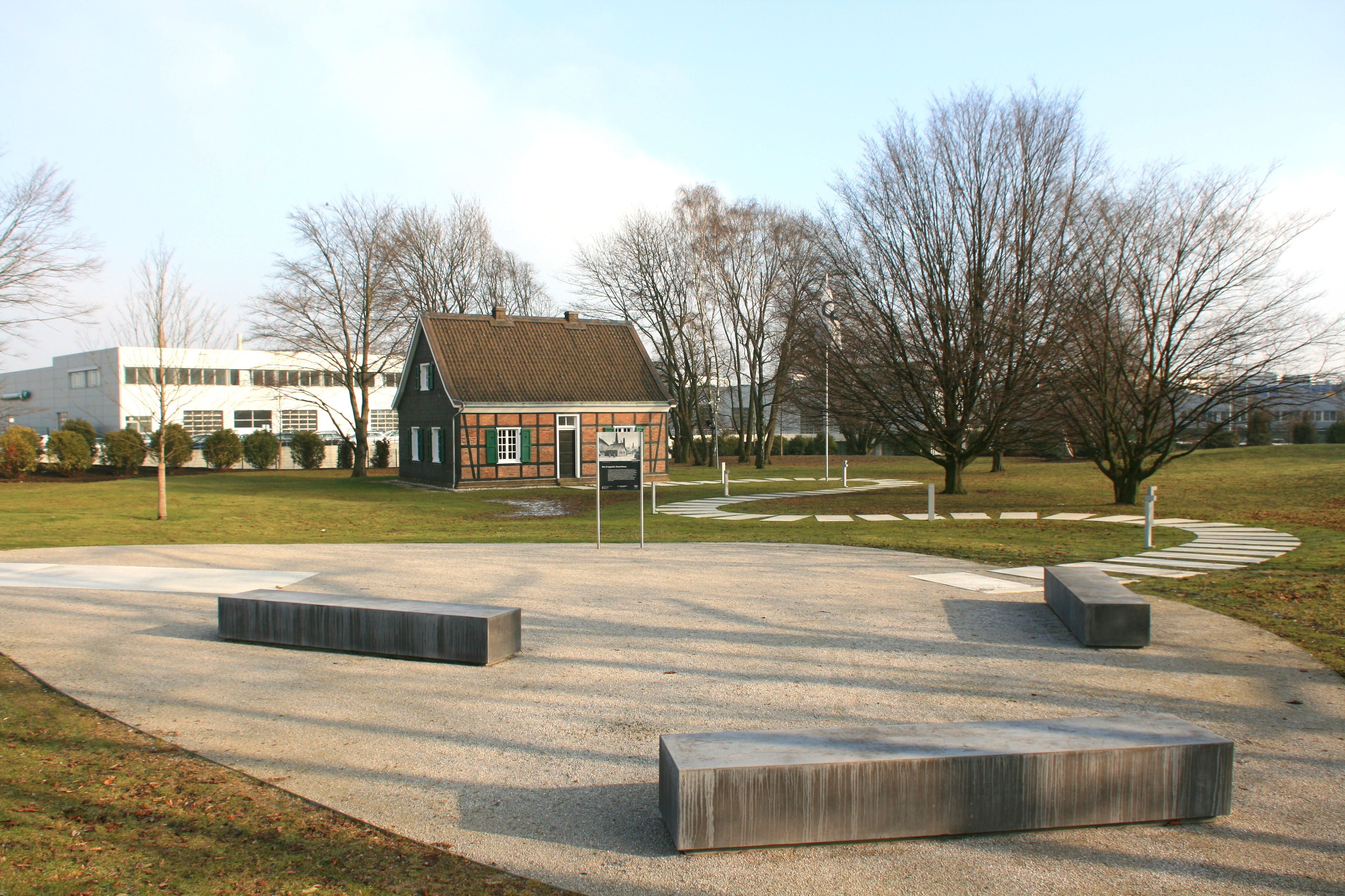 Stammhaus Krupp, Altendorfer Straße in Essen